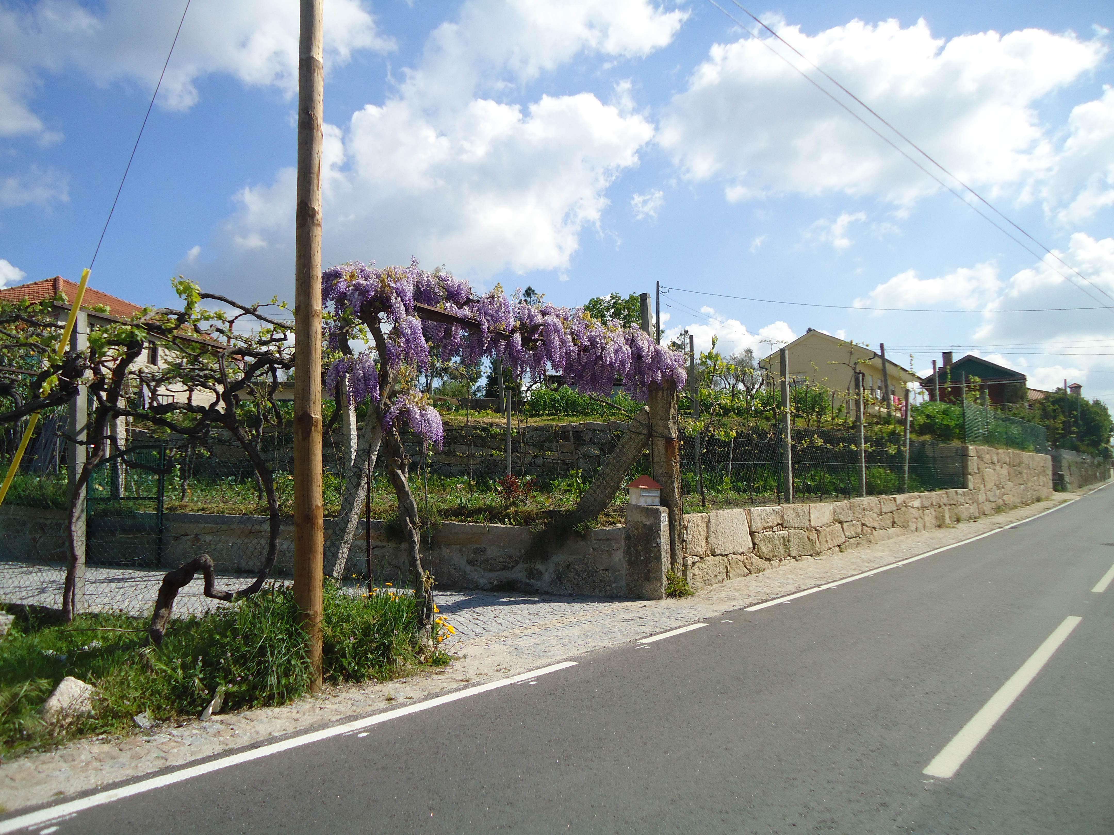 Primavera 2018